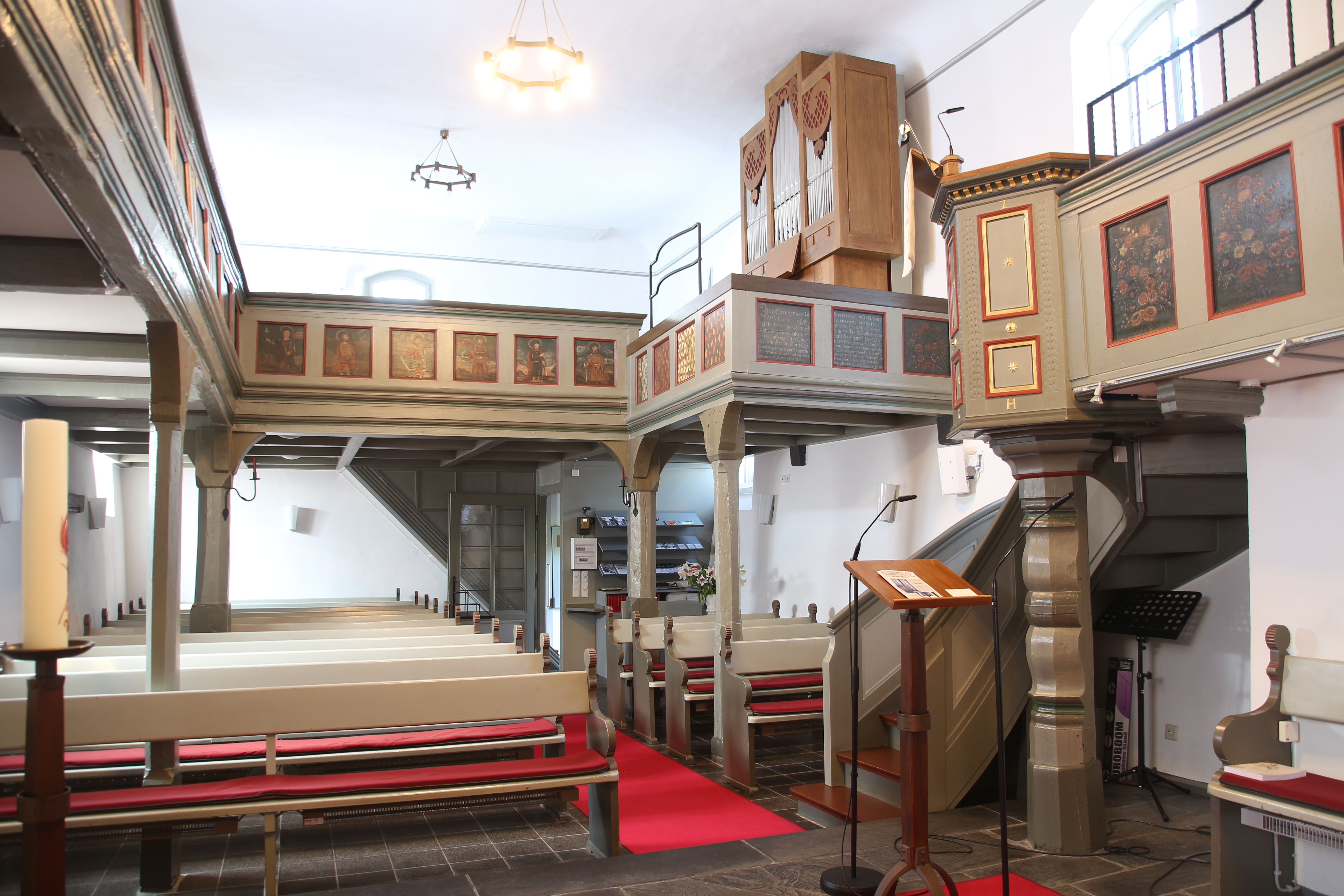 Siehe Bild und Dateiname